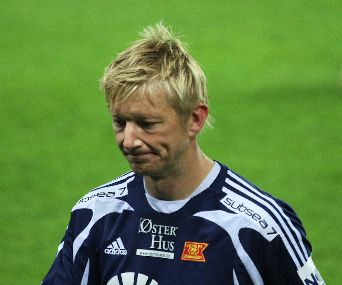 Allan Gaarde